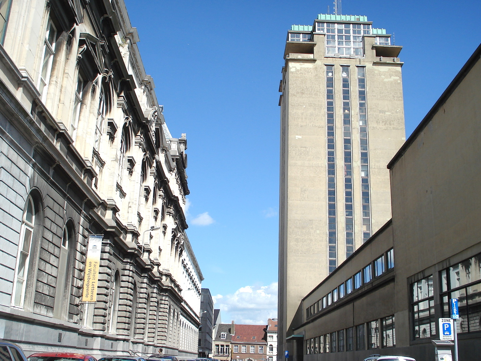 Rue Rozier à Gand, Belgique. Tour de la bibliothèque universitaire ('Tour à livres'), ouvrage d'Henry Van de Velde. À droite: faculté de philosophie et lettres, également d'Henry Van de Velde. À gauche: bâtiment néoclassique de l'Institut des sciences, achevé 1890, oeuvre d'Adolphe Pauli.